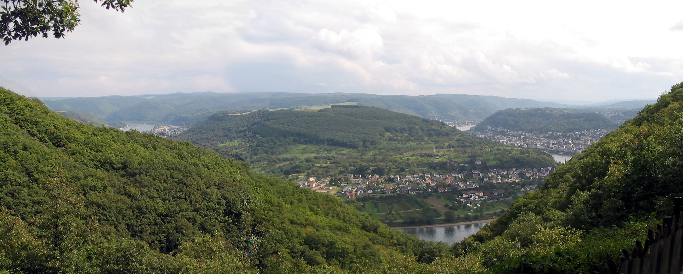 Oberhalb von Boppard bietet sich (dem Rheintouristen) dieses wunderschöne Panorama. Der Ort gegenüber ist Filsen.